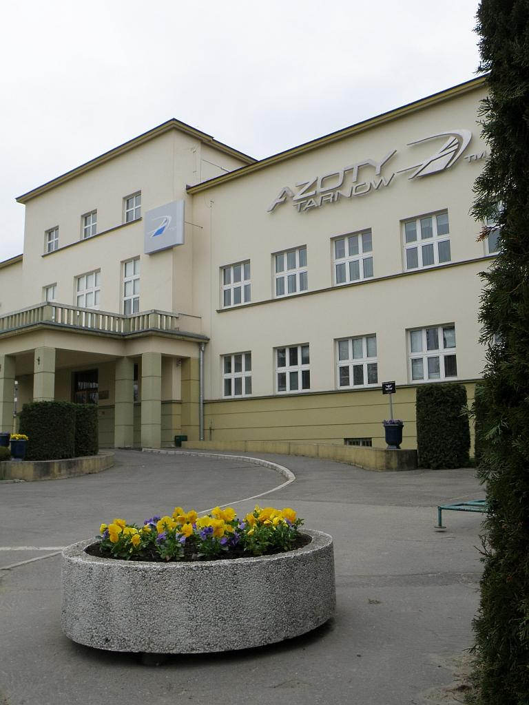 Budynek dyrekcji Zakładów Azotowych w Tarnowie S.A.